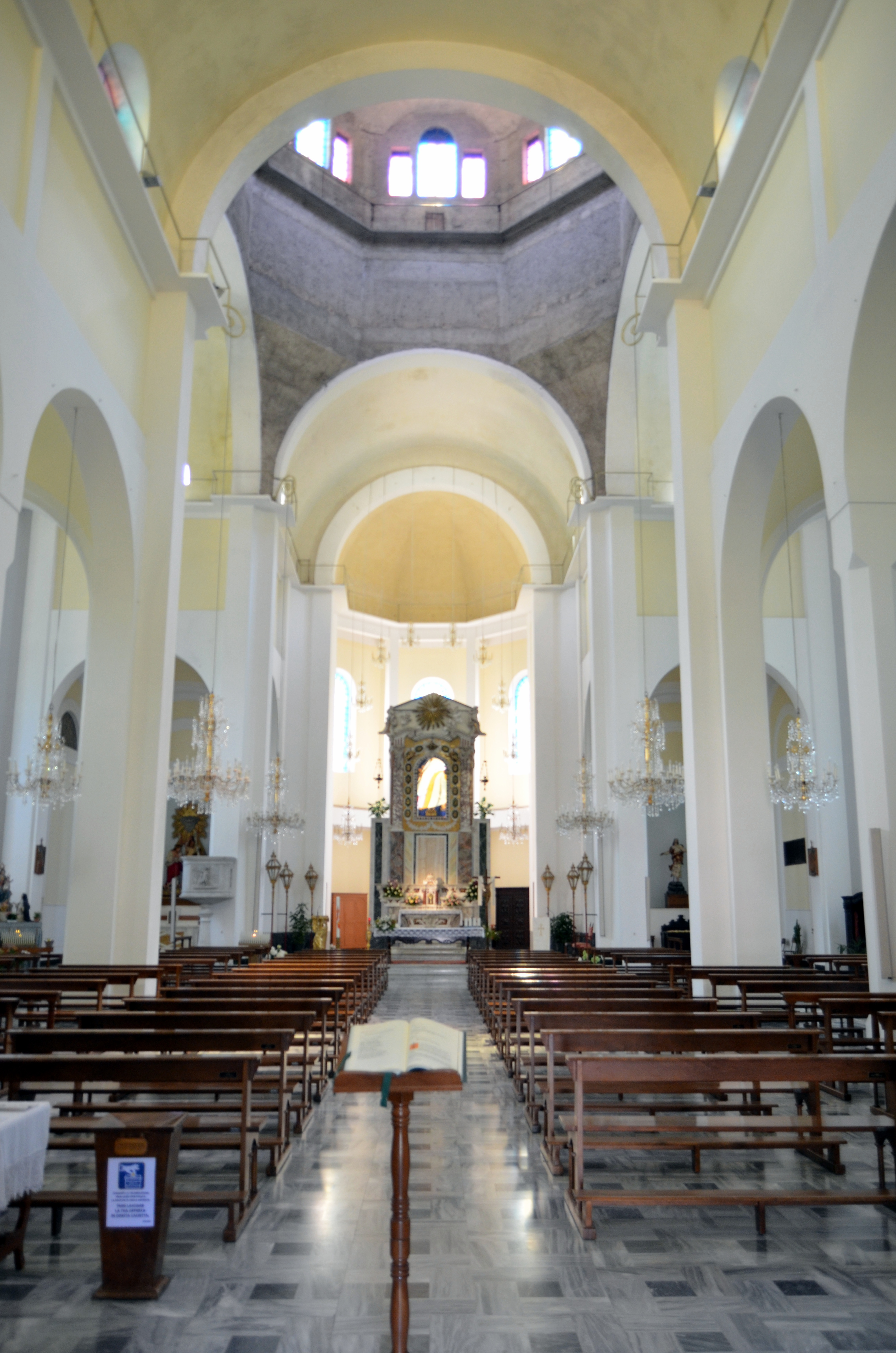 Interno navata del santuario di Nostra Signora dei Miracoli, Cicagna, Liguria, Italia